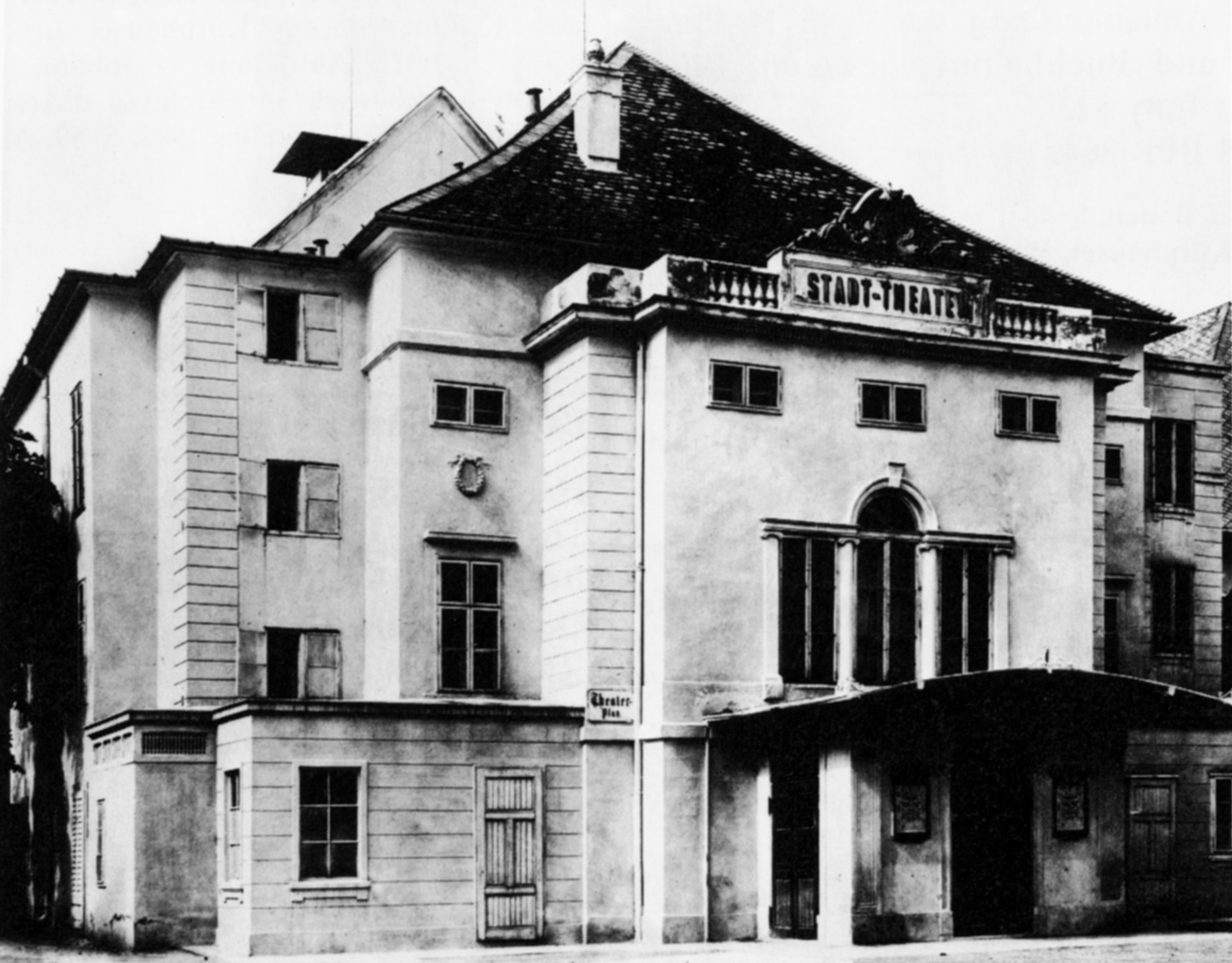 Baden bei Wien, Theaterplatz 7, Stadttheater